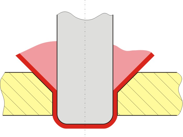 hlboke tahanie